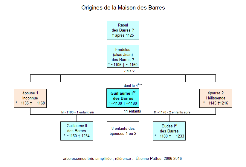 Origines de la Maison des Barres